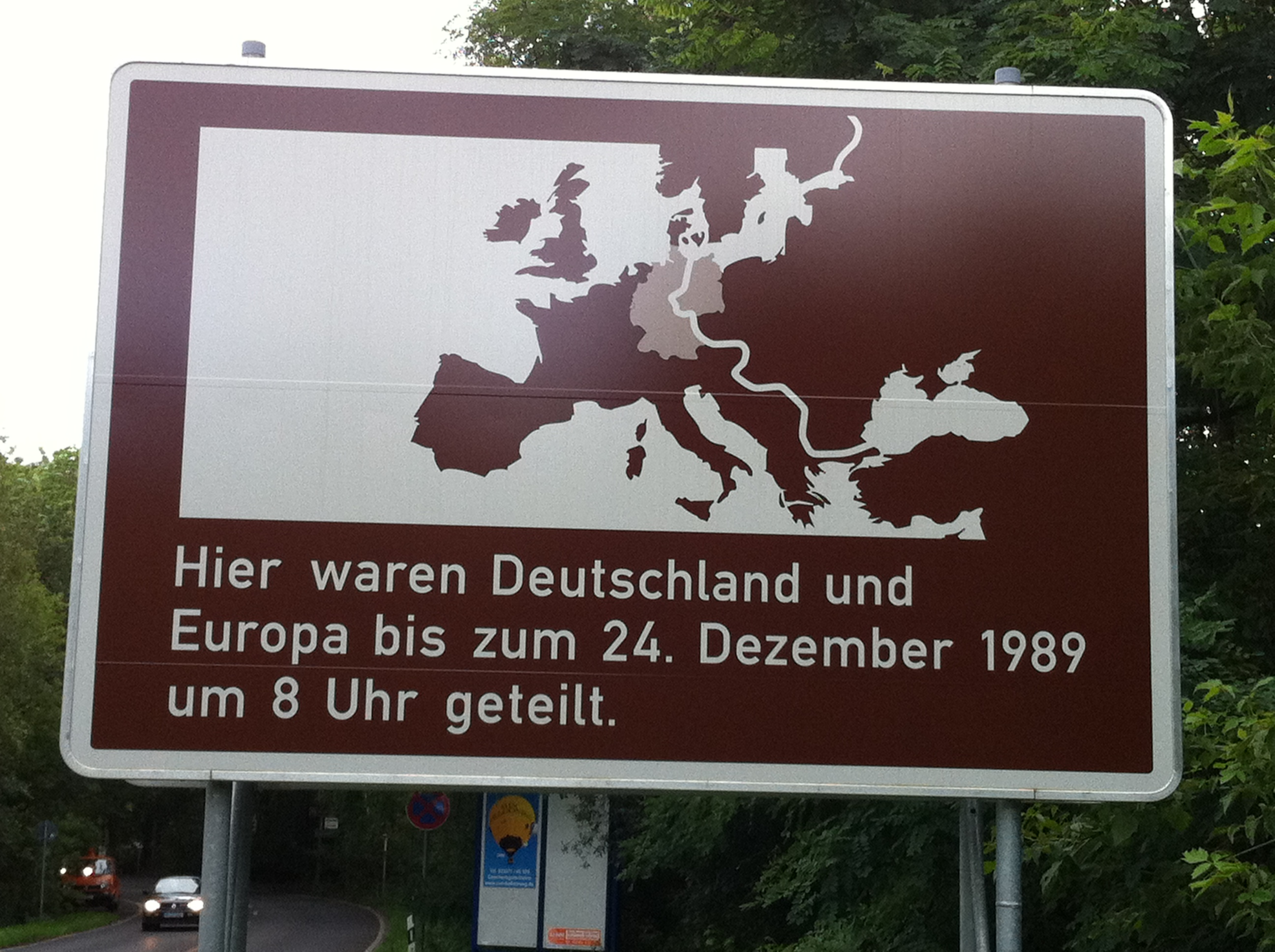 Gedenktafel Deutsche Teilung an der Grenze von Berlin-Spandau zu Groß Glienicke in Brandenburg